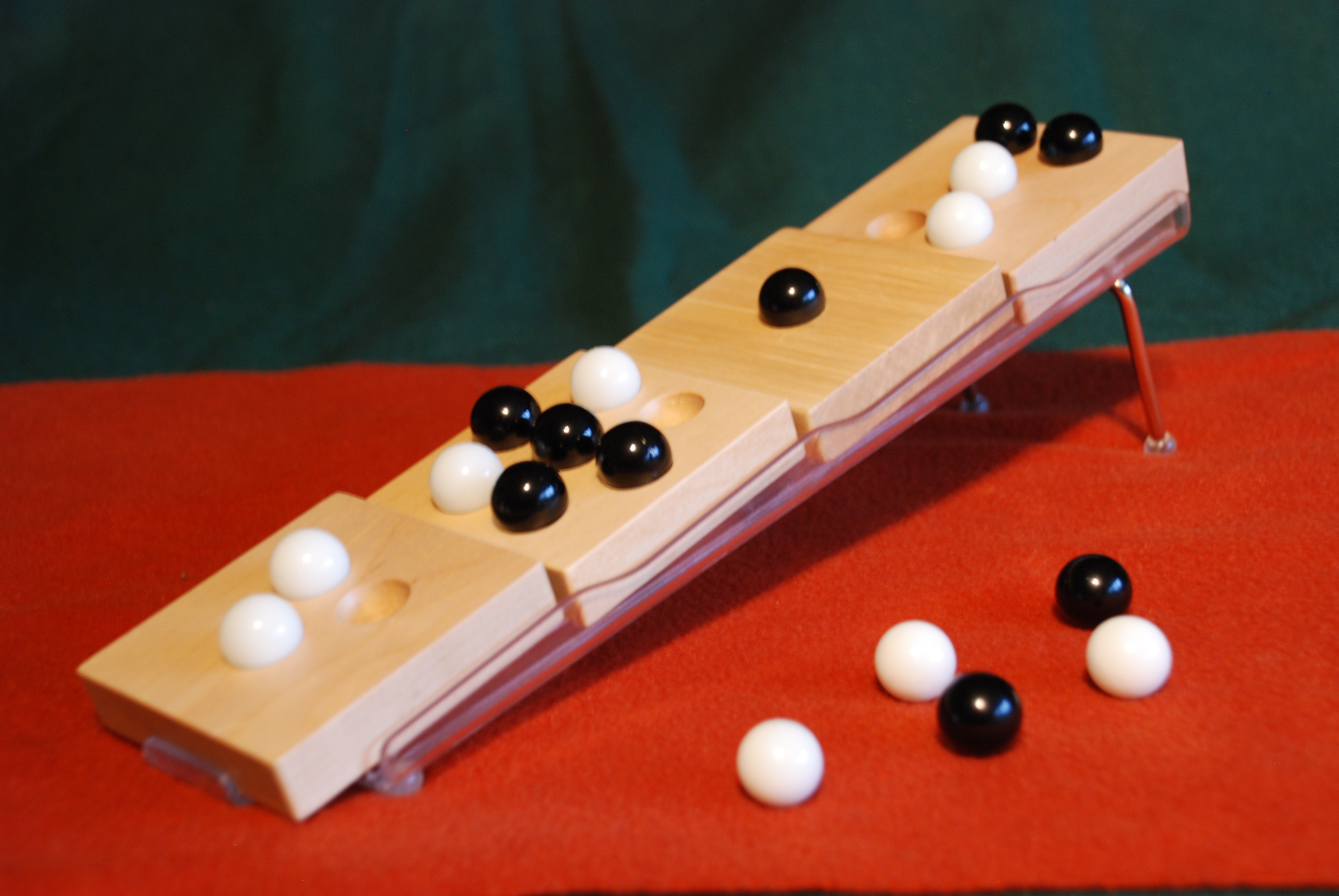 Photographie du jeu Apagos, en cours de partie.